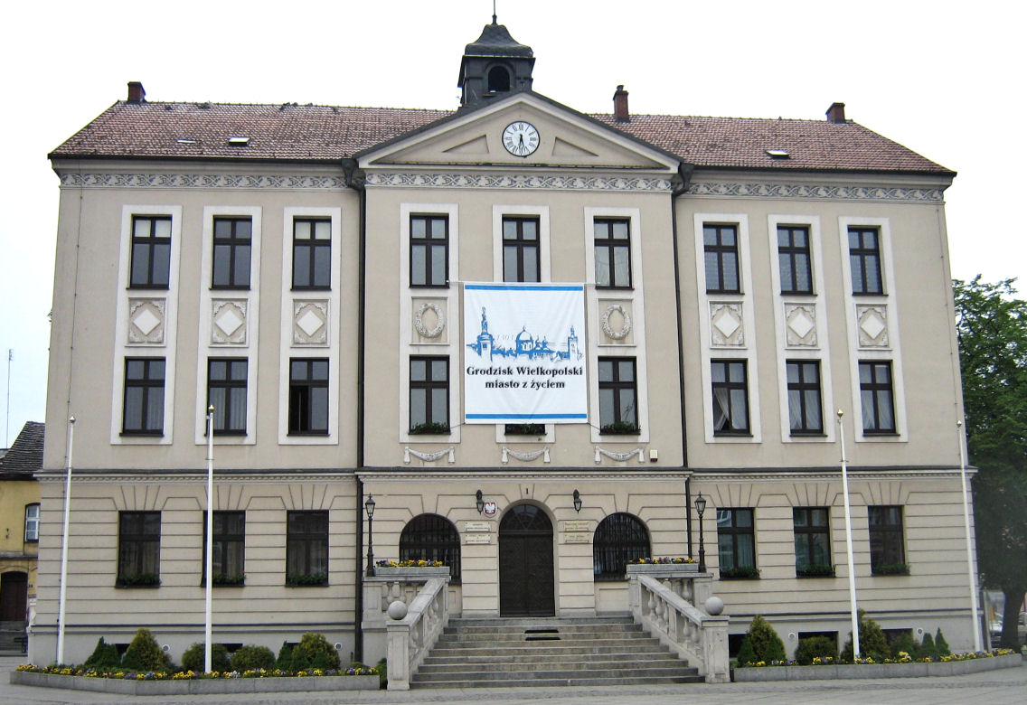 Ratusz w Grodzisku Wielkopolskim (zabytek nr 2657/A)